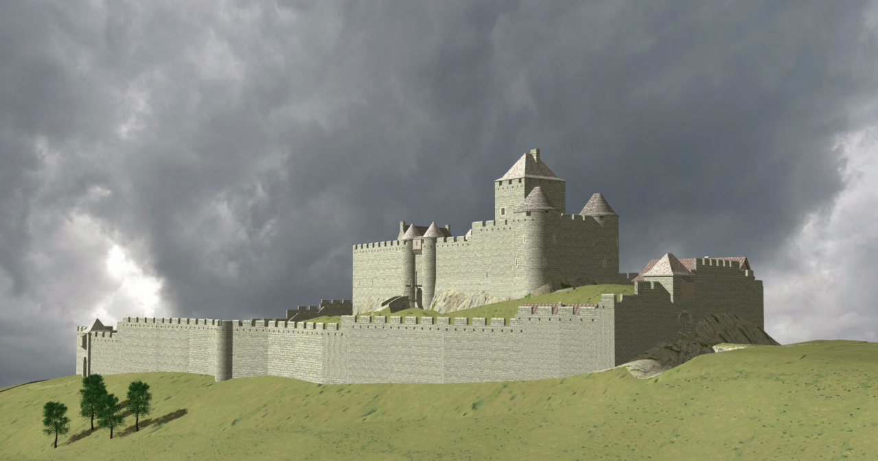 Proposition de restitution du château de Binans au XIVe siècle basé sur le relevé planimétrique du site.